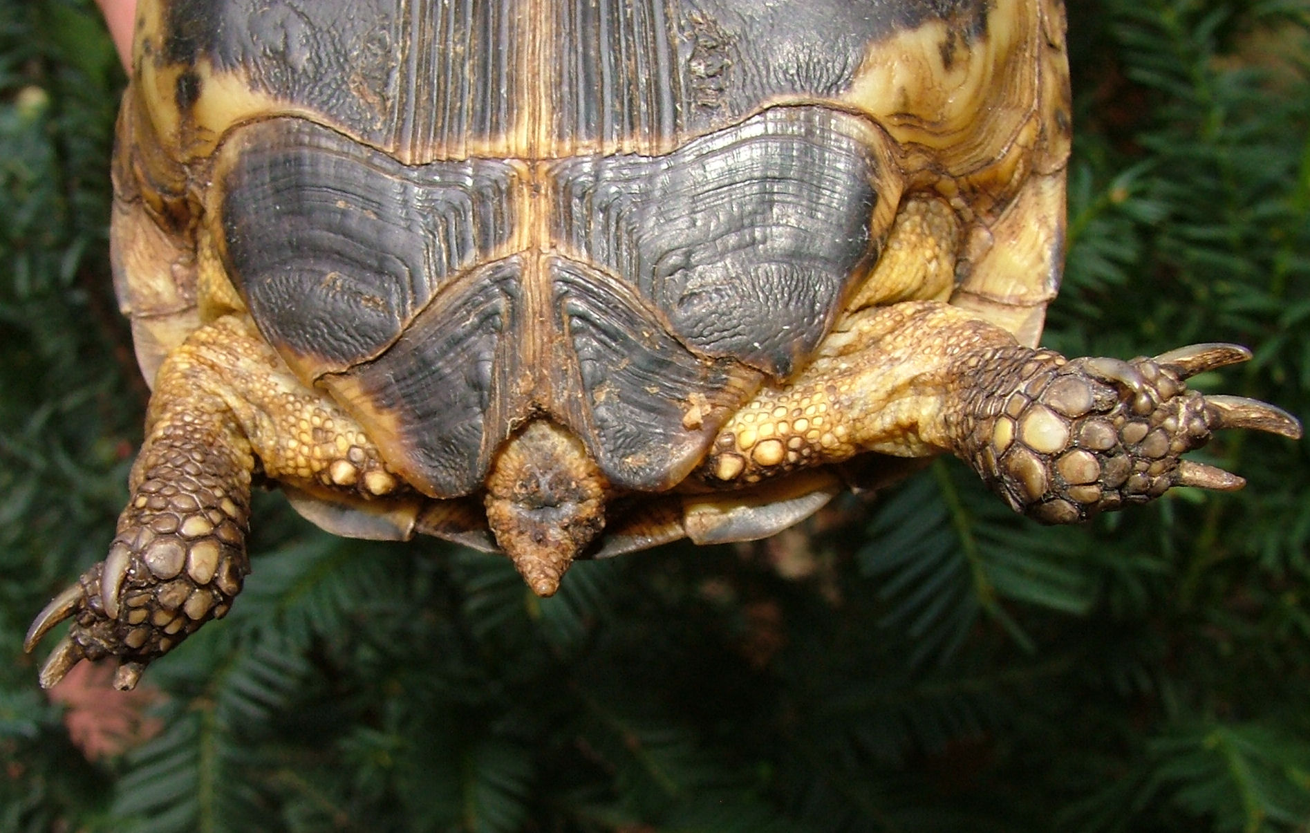 Due coppie di speroni(2x2 spurs)in T.horsfieldii rustamoviRoma, Italia